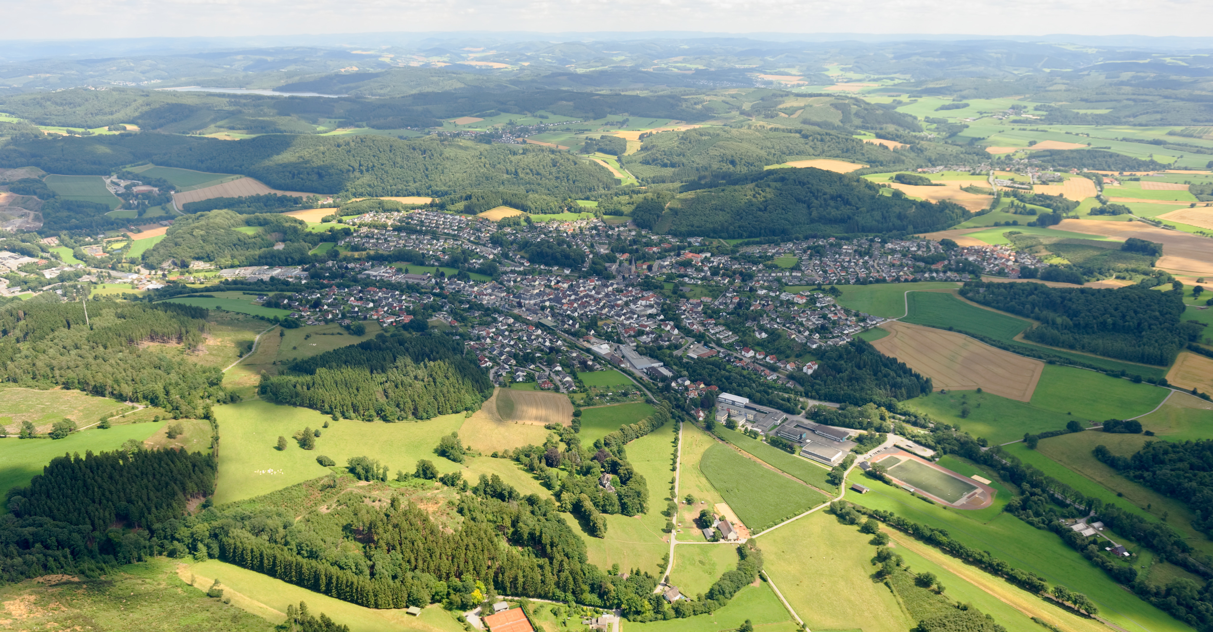 Fotoflug Sauerland West. Luftaufnahme: Balve, Blick Richtung Osten, Nordrhein-Westfalen.